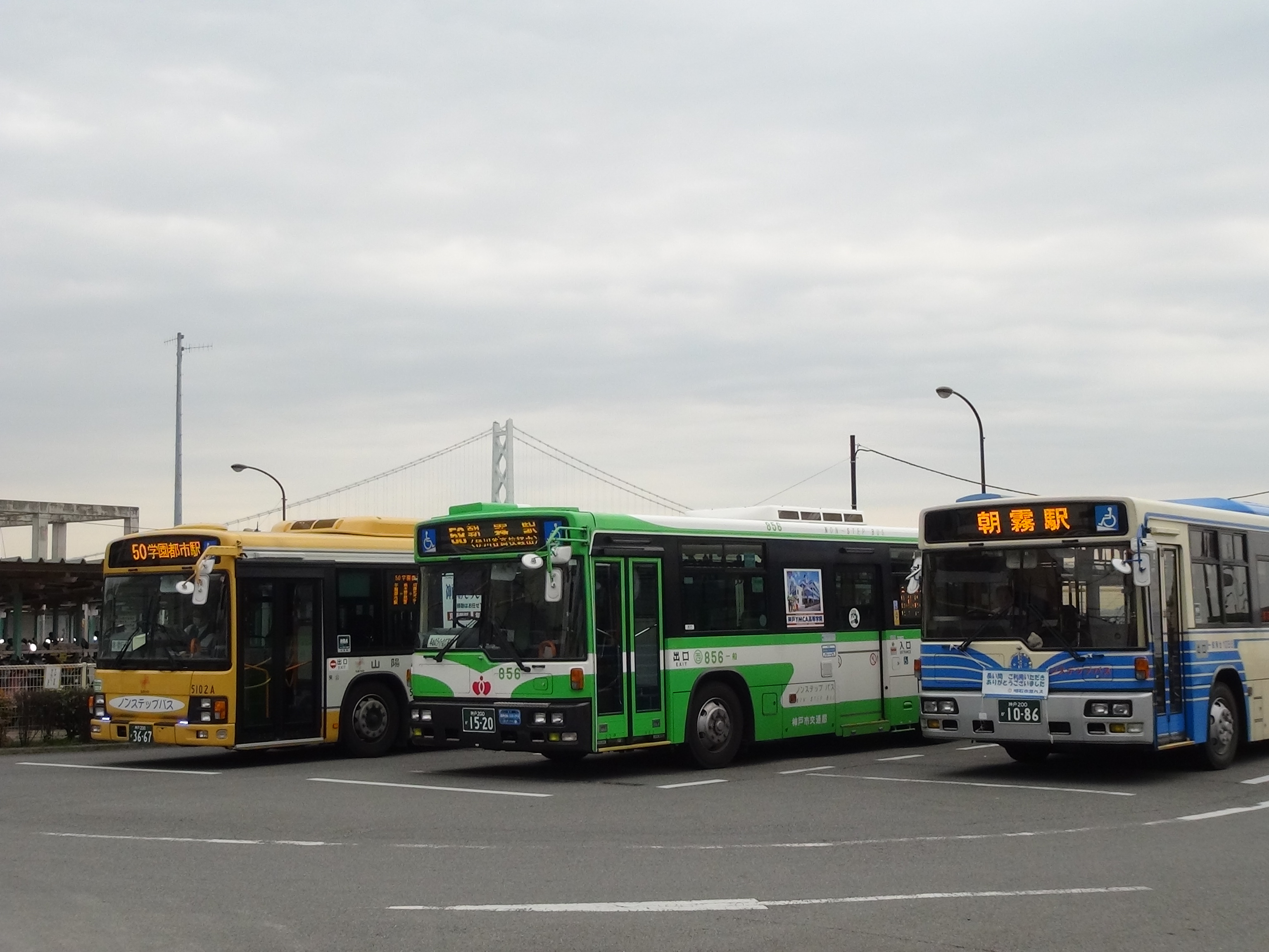 朝霧駅で並ぶ山陽バス・神戸市交通局・明石市交通部